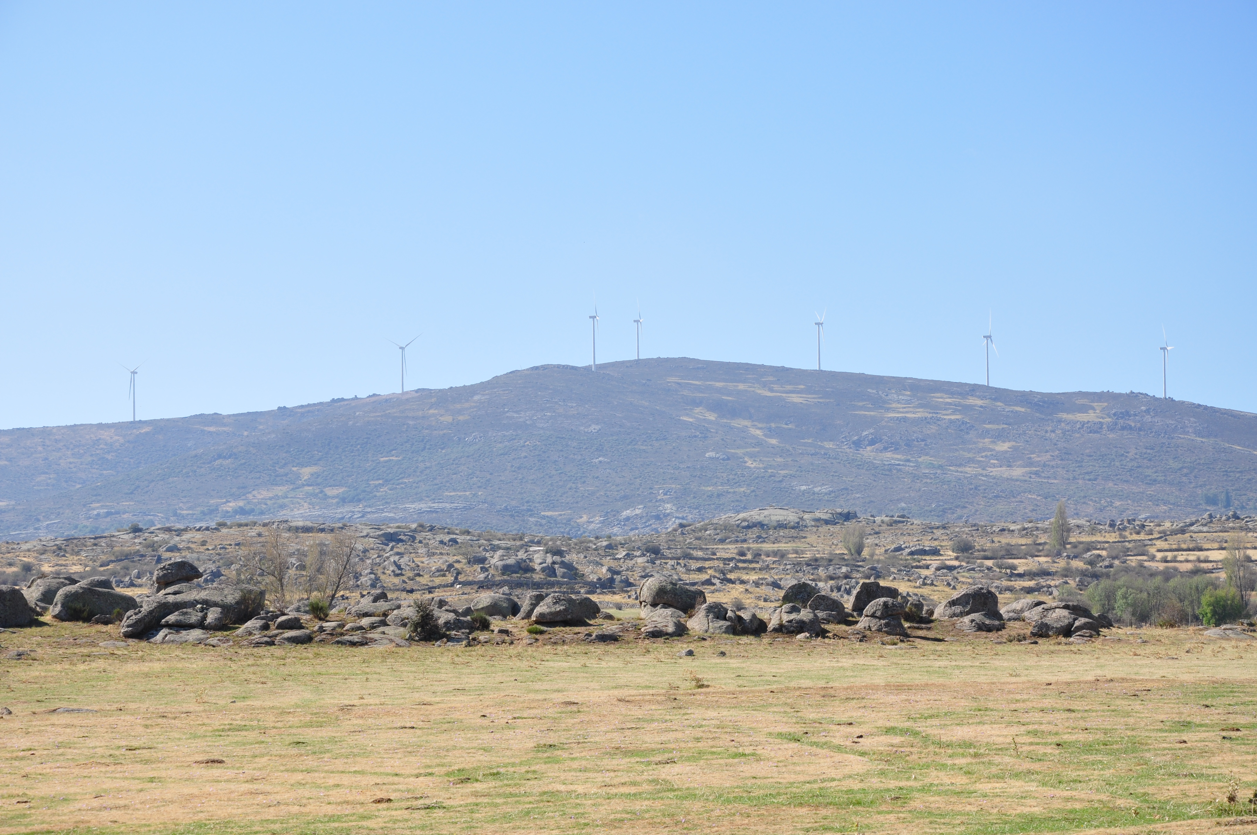 Sierra de Ávila, cara norte desde las cercanías de Cillán, Ávila, España.